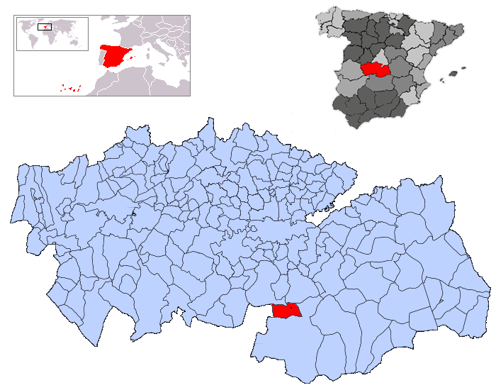 Marjaliza en la provincia de Toledo